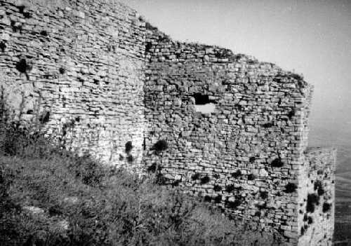 Castello Ventimiglia sul monte Bonifato - tratto delle mura occidentali e la torre di sud-ovest (agosto 1966).